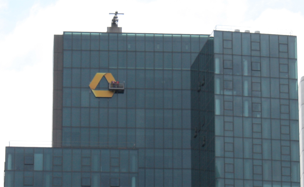 Am Gallileo-Tower wurden heute die neuen Commerzbank-Logos montiert. Zu sehen sind Arbeiter am neuen Logo.